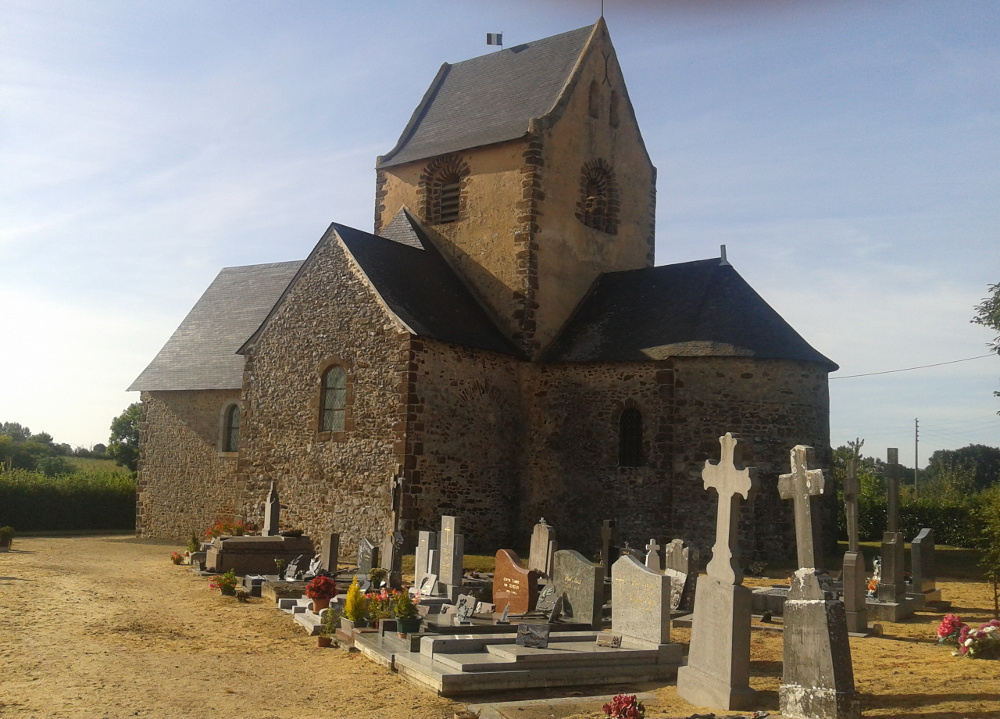 Église Saint-Jean-Baptiste de Bannes. .